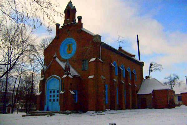 костьол у Таращі